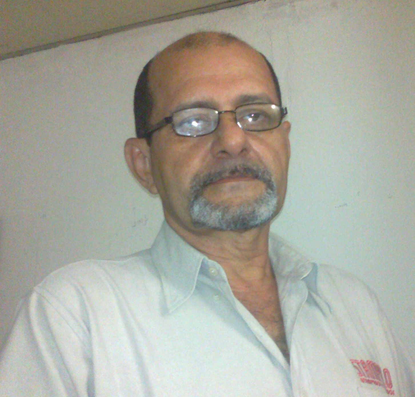 foto para ficha bibliográfica